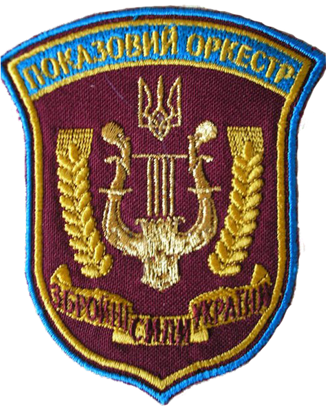 Нарукавний знак окремого Показового оркестру Збройних Сил України